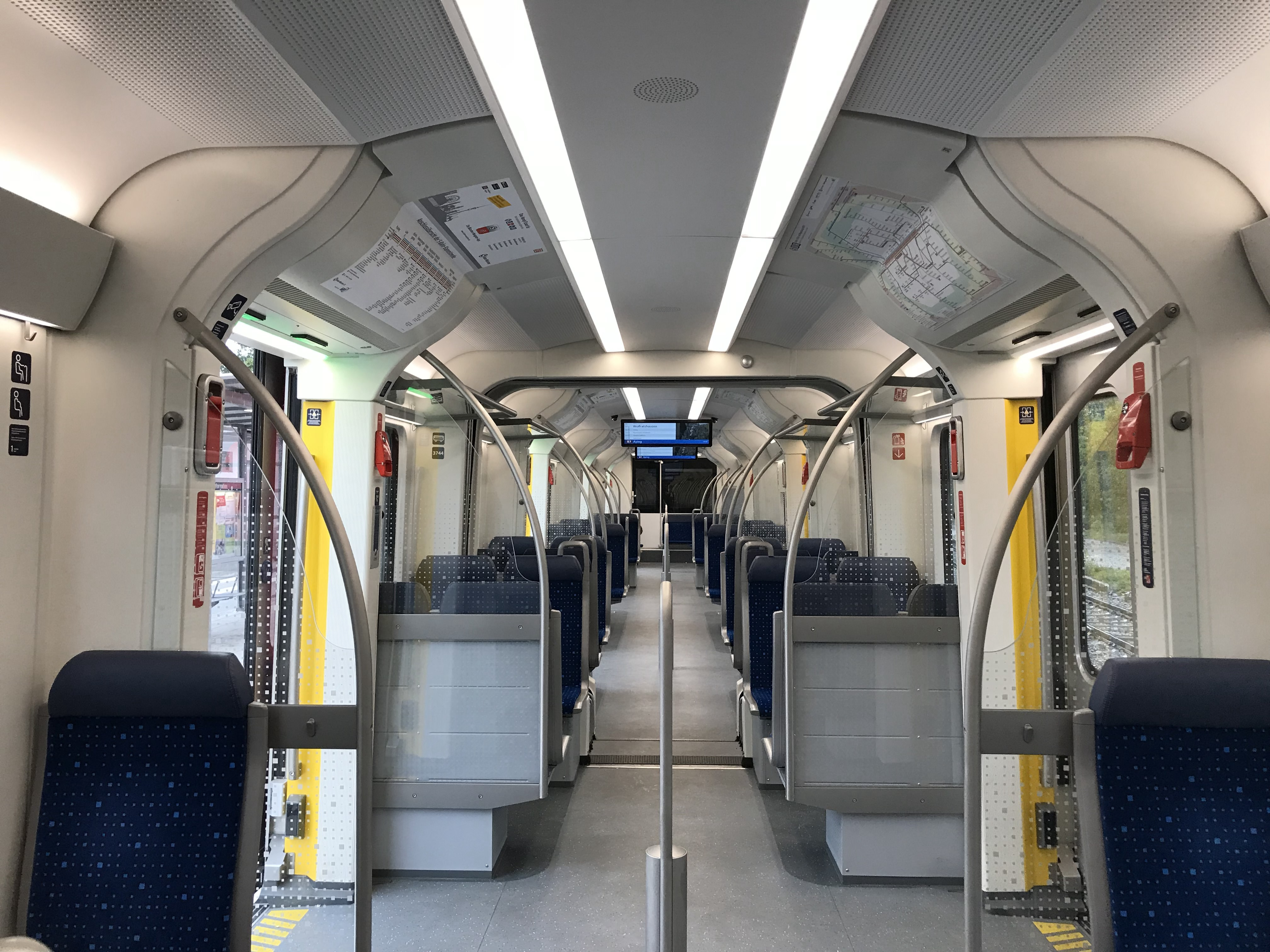 Innenraum eines ET423 der S-Bahn München